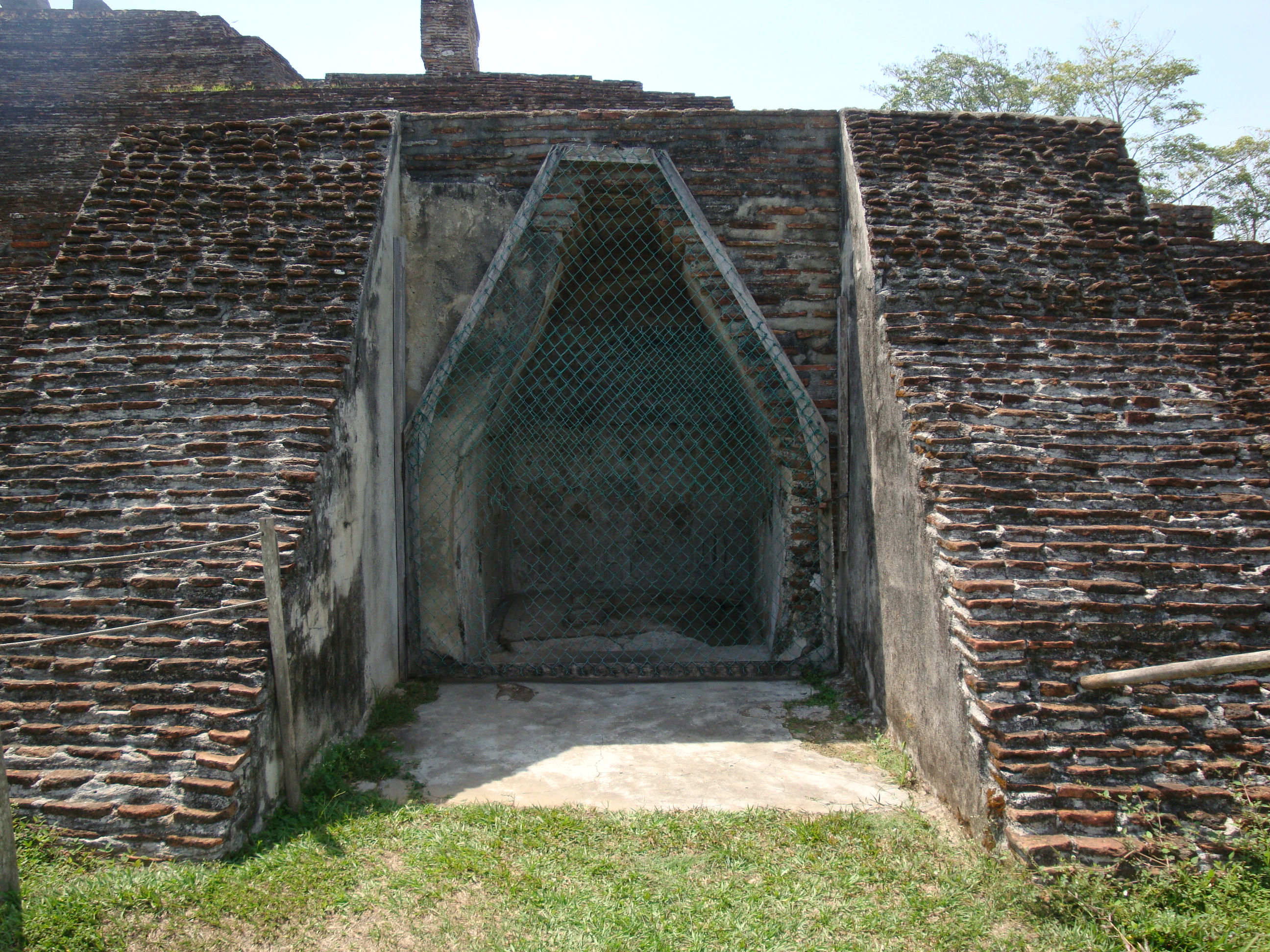 Entrada a la tumba de los "Estucos" o de los Nueve Señores de la Noche, en la ciudad maya de Comalcalco, Tabasco, México.